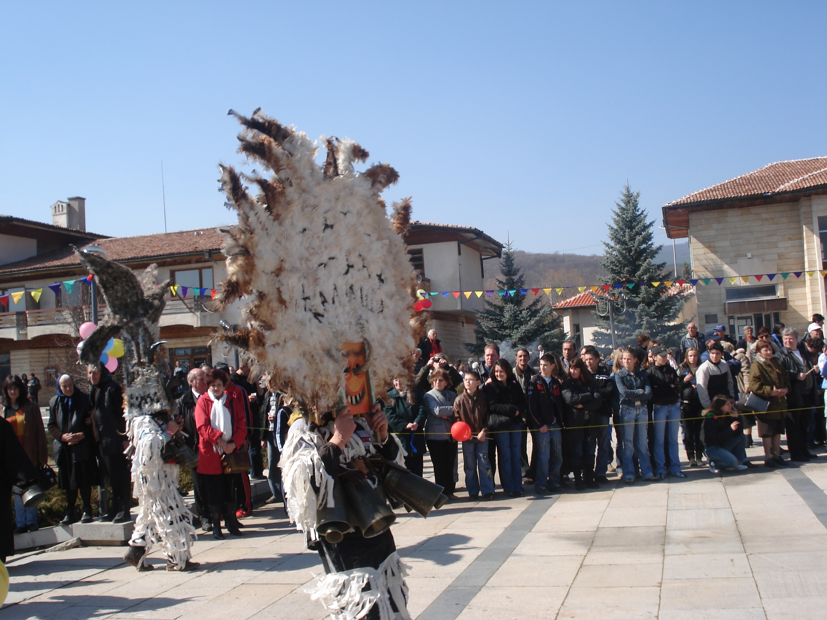 Празнуване на "Сурова" в село Калище